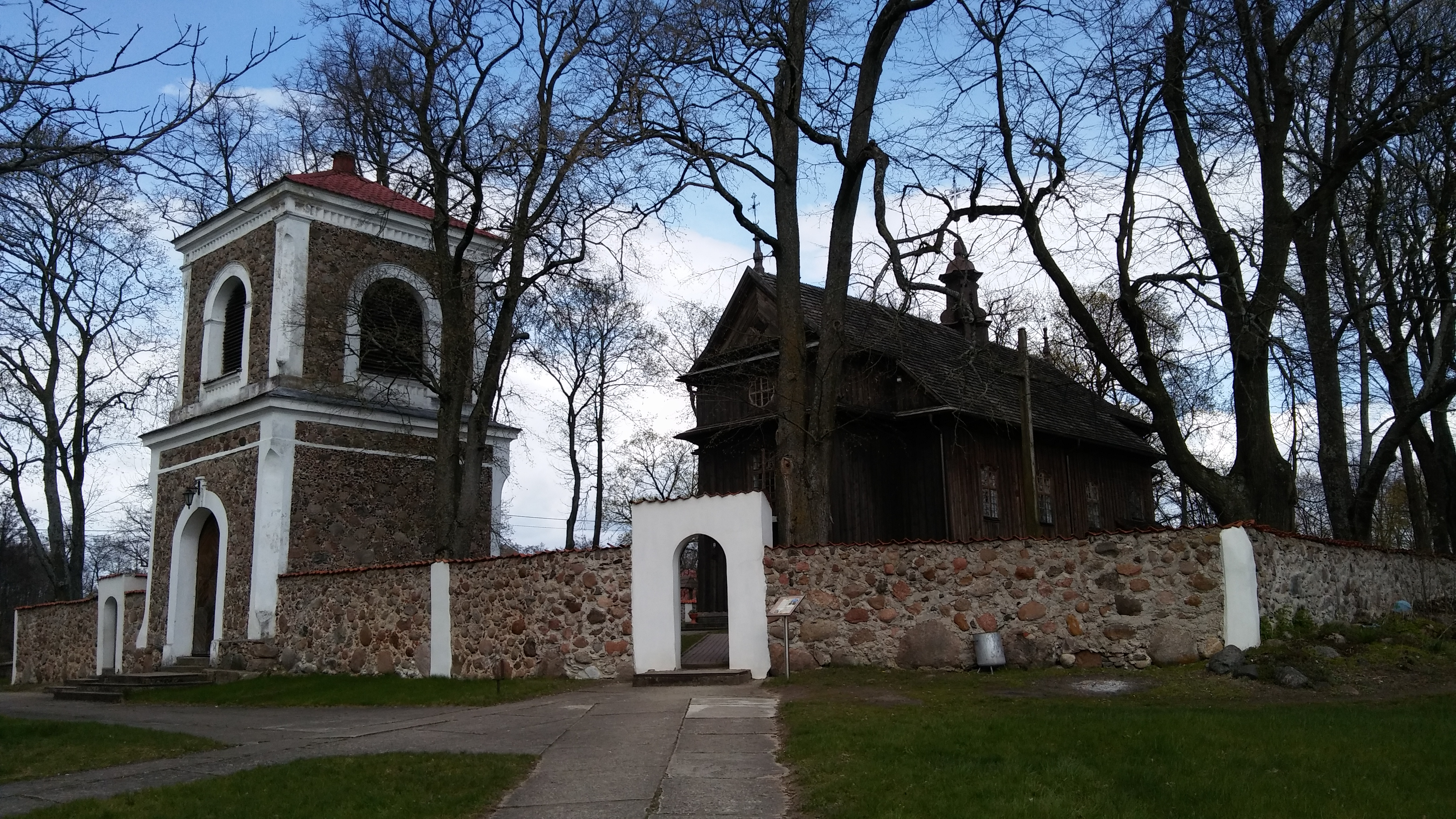 Modrzewiowa, późnobarokowa świątynia